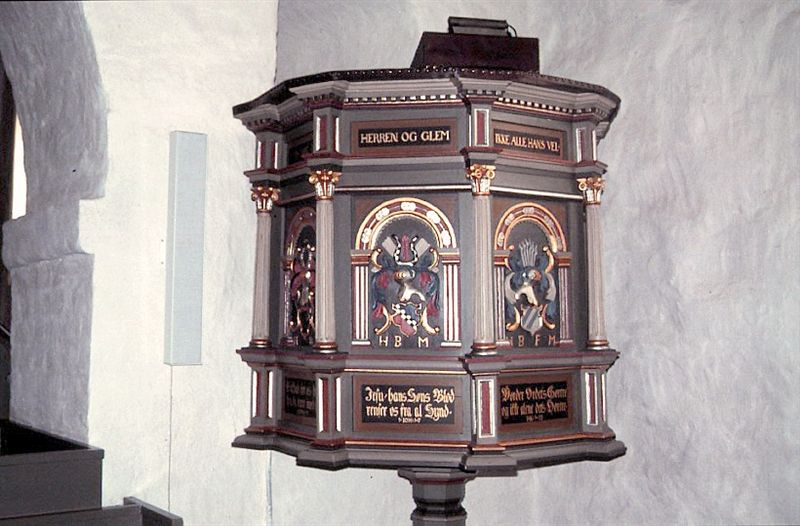 Vindum Kirke, Viborg Kommune, prædikestol